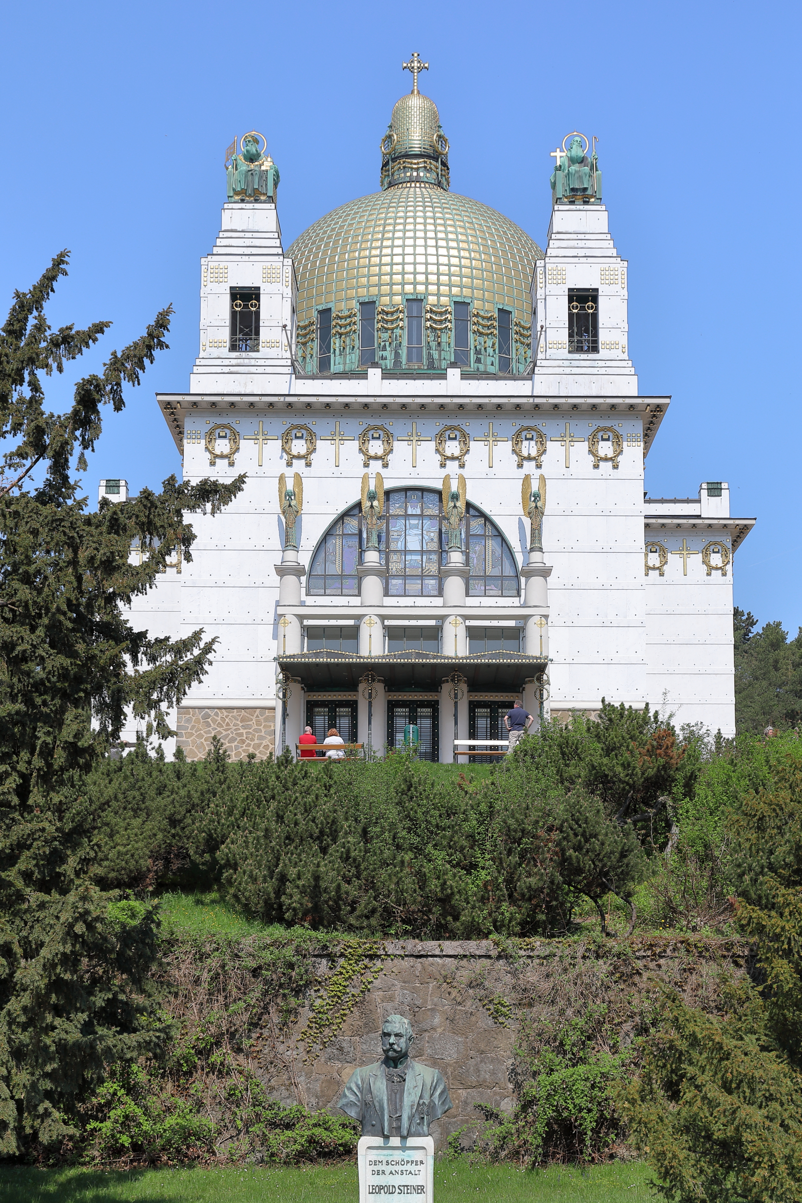 Hauptfassade bzw. Südansicht der Kirche am Steinhof, auch Leopoldskirche bezeichnet, auf dem Gelände des „Sozialmedizinischen Zentrums Baumgartner Höhe“ im 14. Wiener Gemeindebezirk Penzing und das Leopold-Steiner-Denkmal.Die Kirche wurde von 1904 bis 1907 über dem traditionellen Grundriss eines griechischen Kreuzes nach Plänen des Architekten Otto Wagner als Anstaltskirche errichtet. Sie ist der bedeutendste Sakralbau der Wiener Moderne in Wien. Das Steiner-Denkmal entstand 1907 und zeigt den späteren Landeshauptmann von Niederösterreich, der die Bauoberleitung der Spitalsanlage, inklusive der Anstaltskirche, inne hatte.